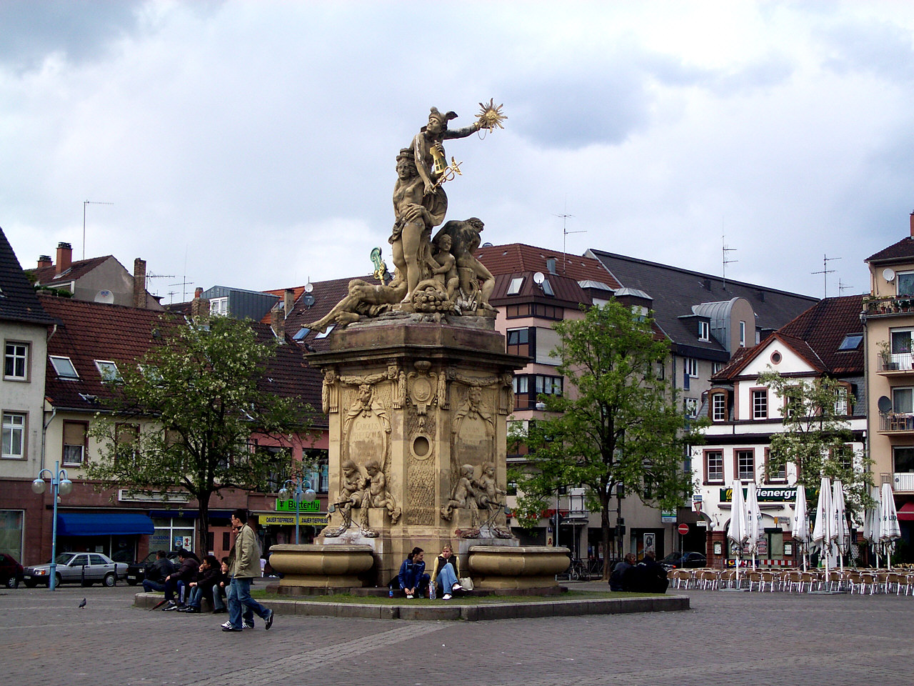 Mannheim, Germany: Marktplatz-Denkmal (1760) mit den Figuren Merkur, Stadtgöttin, Rhein und Neckar; Mitarbeit des Maximilian Joseph Maria Pozzi, Massimiliano Giuseppe Maria P. (1770–1842), Bildhauer.